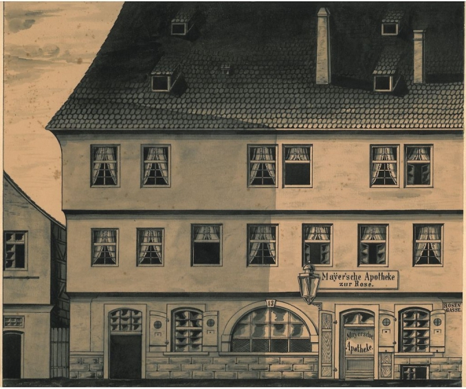 Heilbronn, Mayer'sche Apotheke zur Rose. Gouache von Wilhelm Jahn, 35 × 28 cm